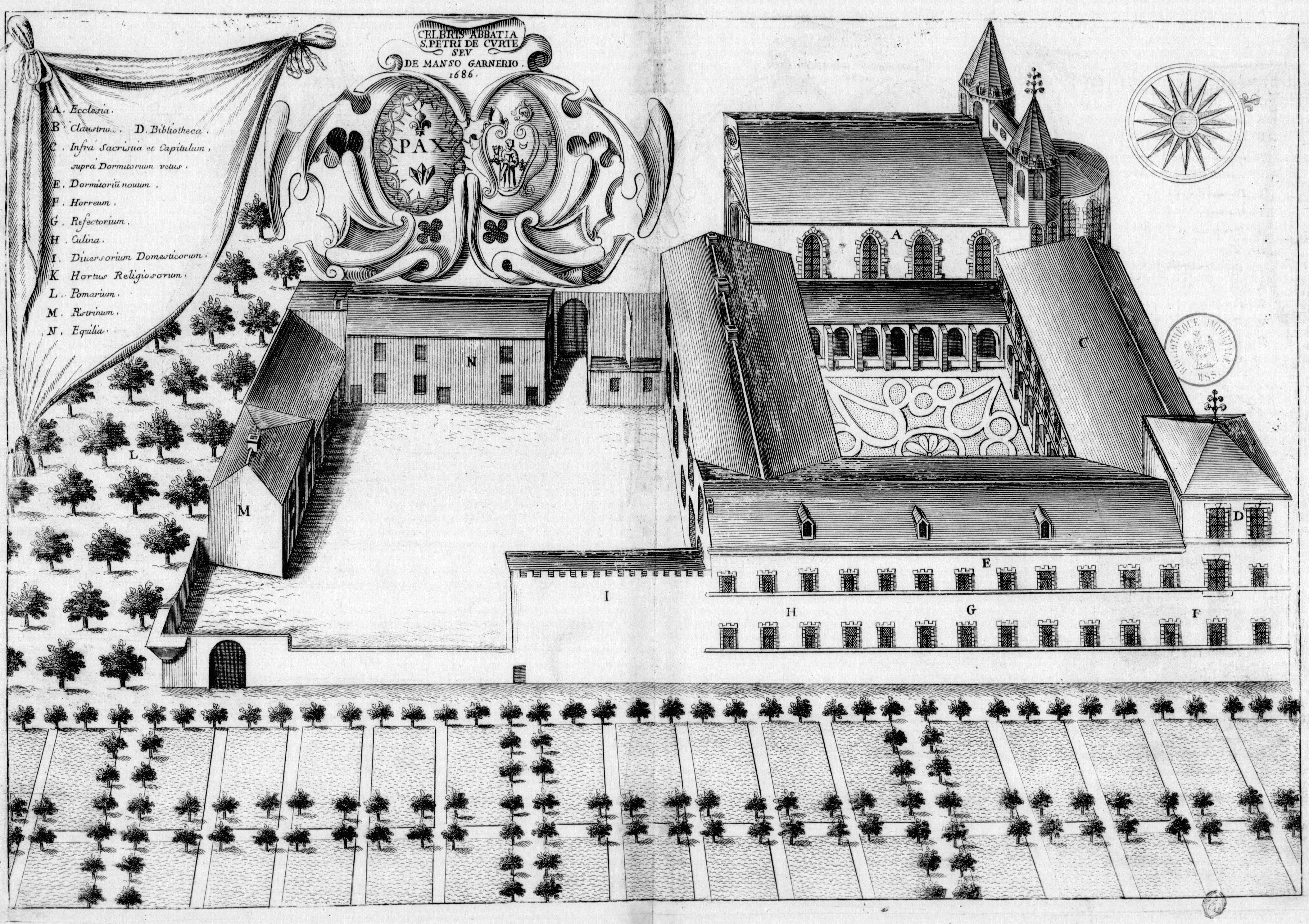 Planche gravée du 17ème siècle représentant l'abbaye Saint-Pierre du Mas-Garnier, en France, dans le livre Monasticon Gallicanum.